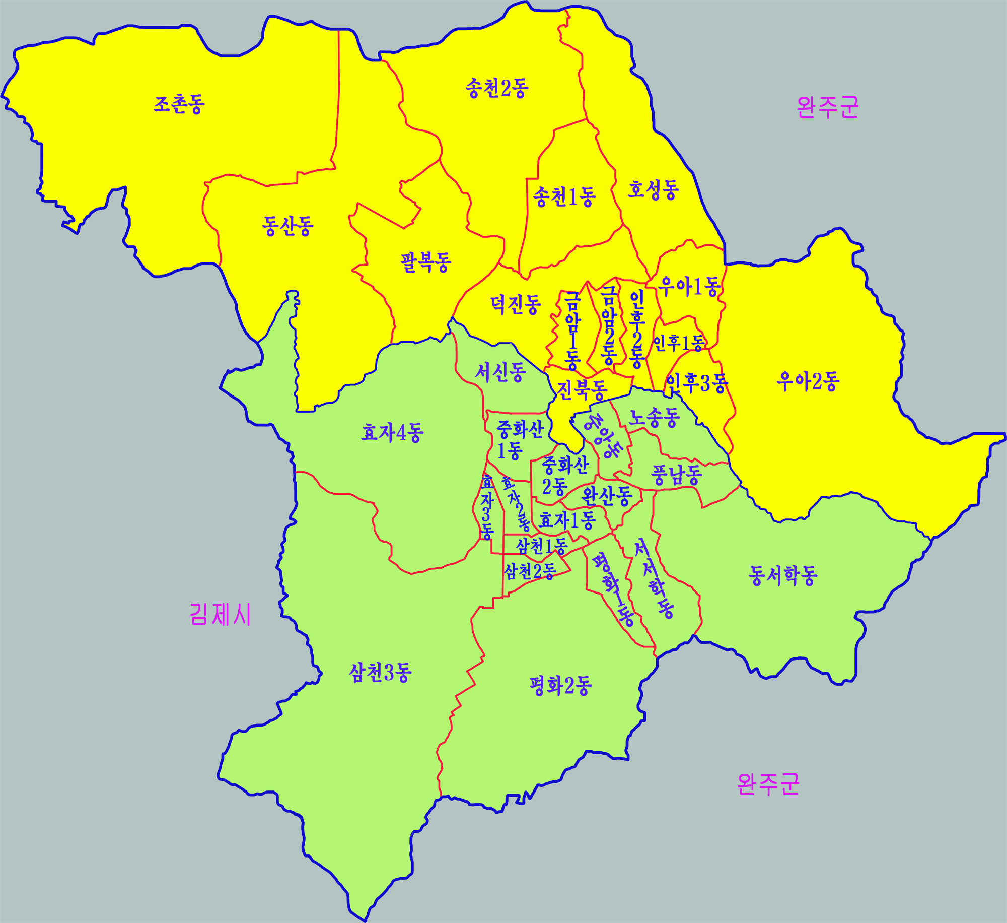 전주시 행정구역도